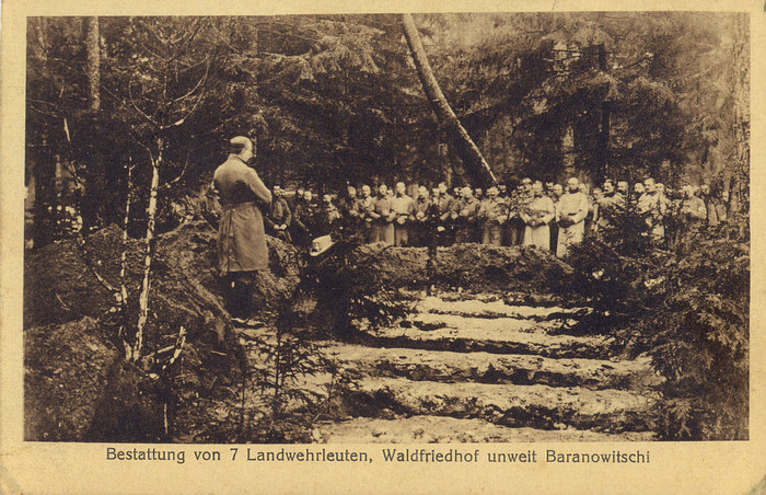 Беларуская (тарашкевіца): Паштоўка. Пахаваньне 7 нямецкіх жаўнераў Ландвэру на вайсковых могілках у лесе недалёка ад Баранавічаў Die Karte ist am 30.9.19 gelaufen und das bedeutet nicht, dass die Bestattung auch im September stattfand.--Richaardo (talk) 13:45, 21 June 2015 (UTC)